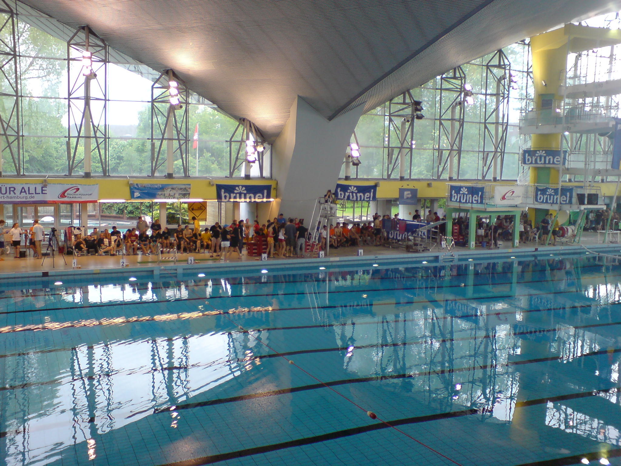 Alsterschwimmhalle Hamburg. Aufgenommen während der Deutschen Hochschulmeisterschaften Schwimmen 2007, 11.-13. Mai.